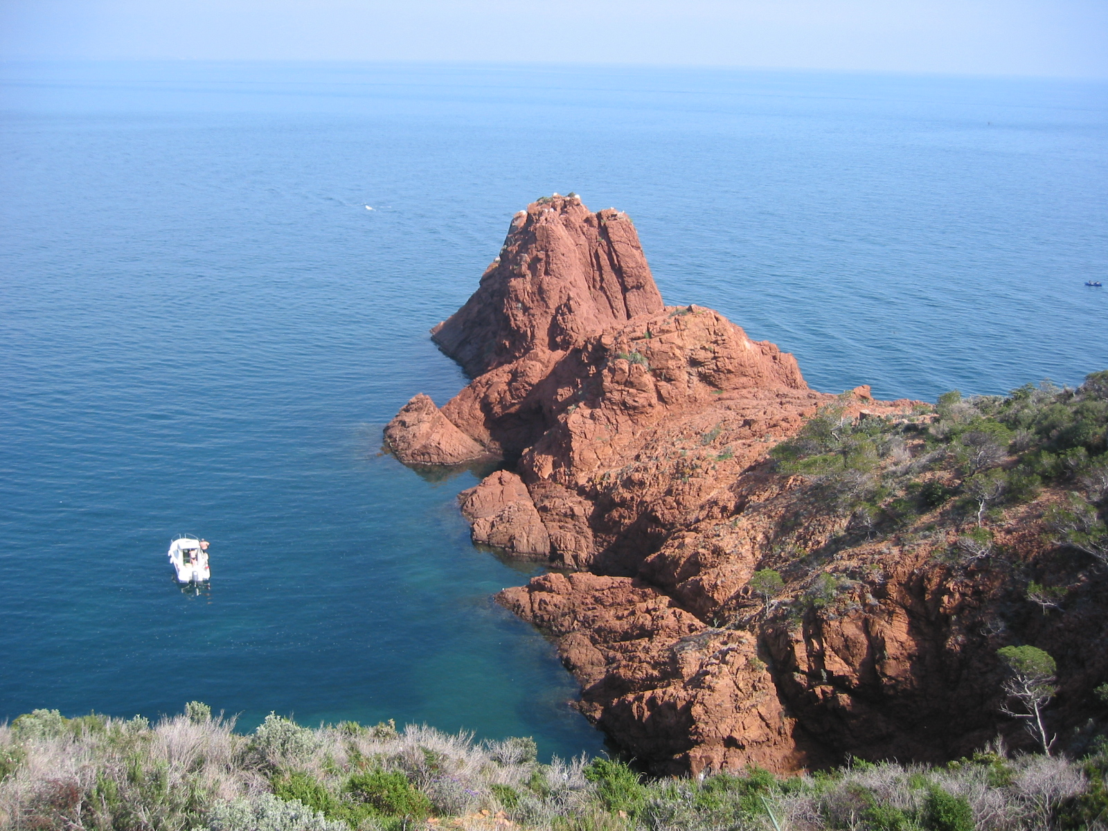 Le Massif de l'Esterel, Alpes-Maritimes, France Photo prise le 2 avril 2006 Aut : Jddmano